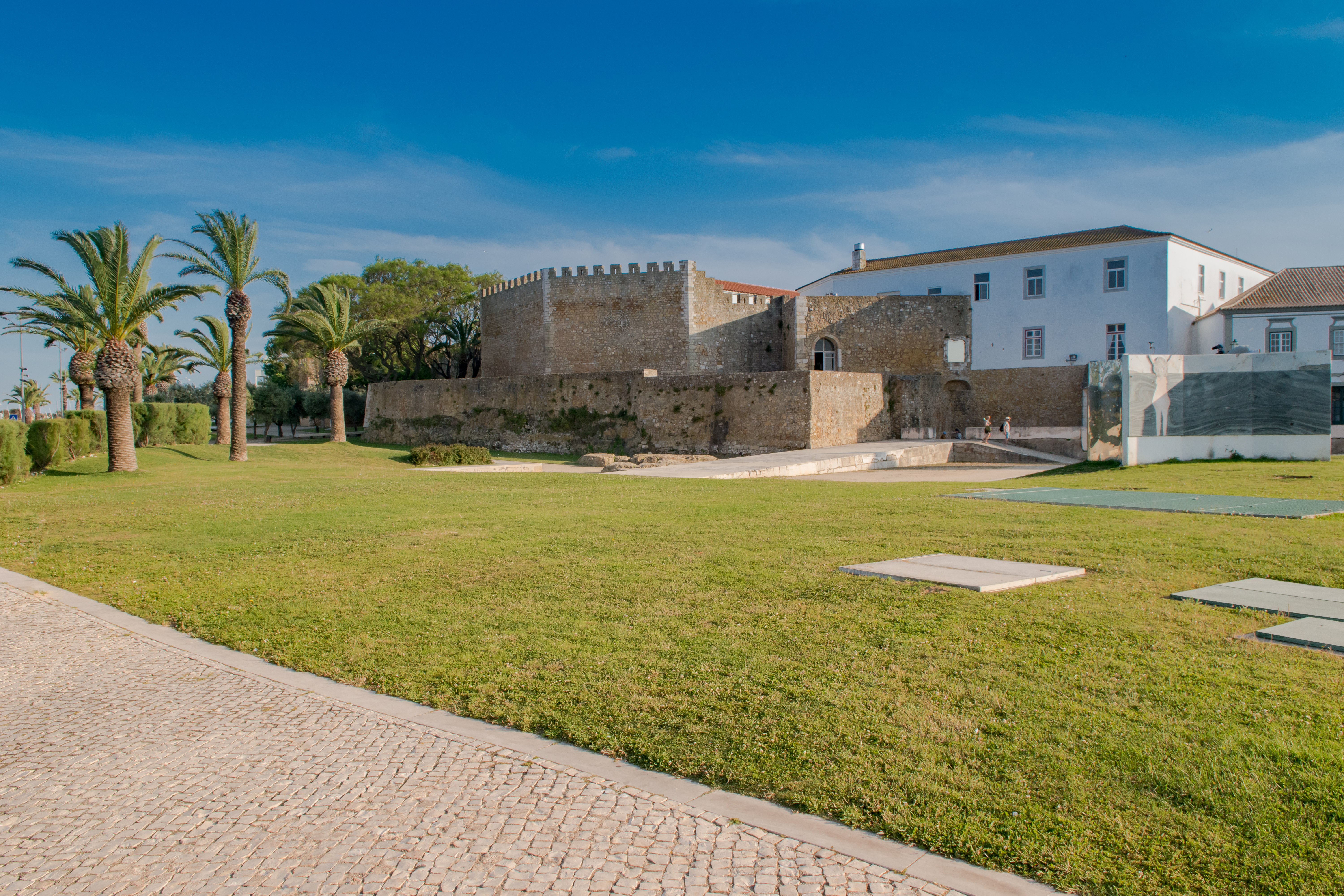 Lagos ist eine Hafenstadt an der portugiesischen Algarveküste.